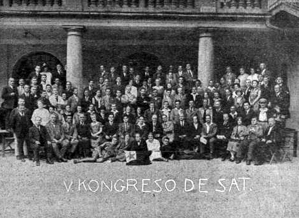 SAT-kongreso en 1925 en Vieno, Aŭstrio. Komuna foto de la partoprenantoj.